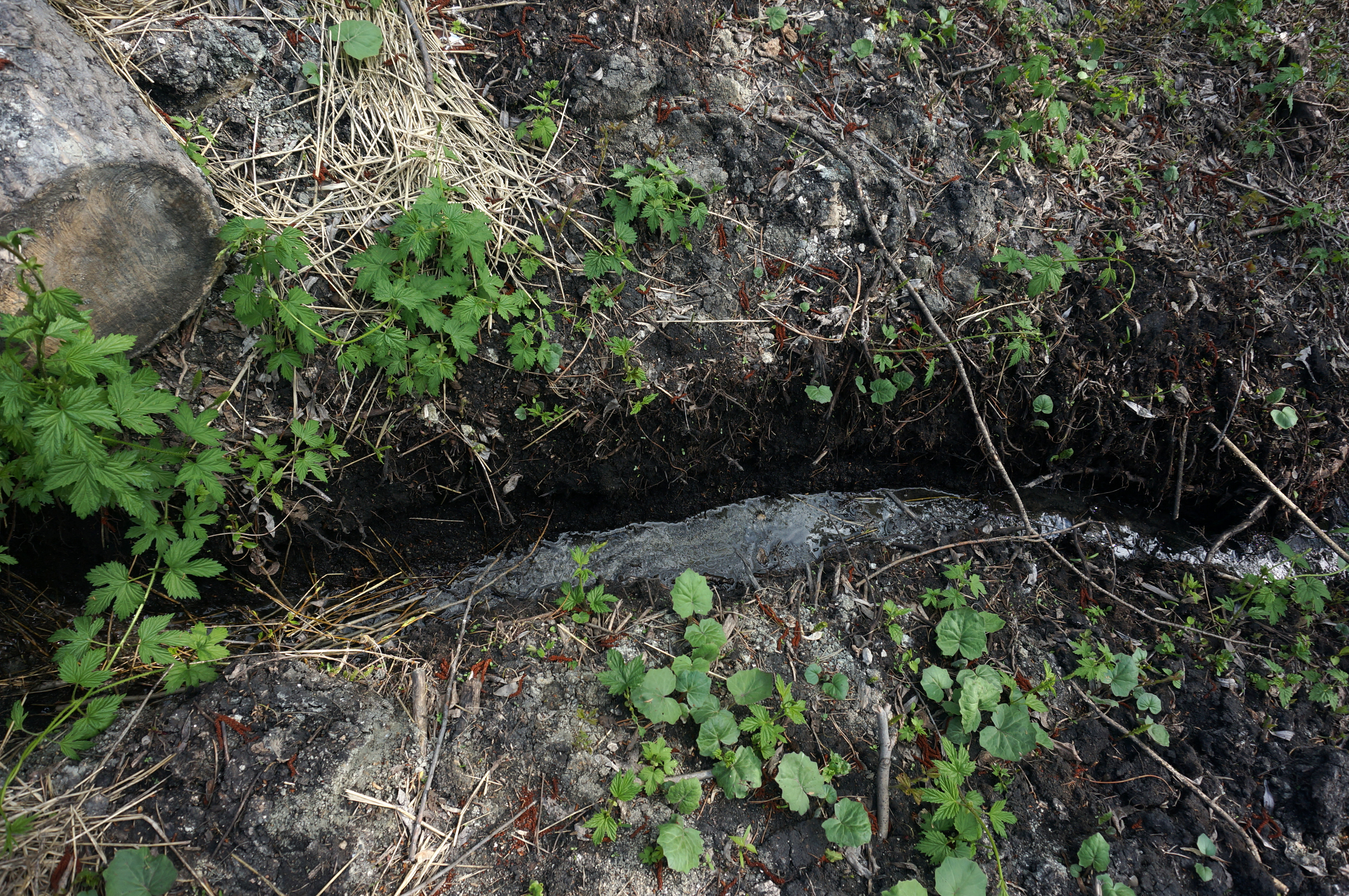 Родник в окрестностях с. Чубовка, Кинельский район Самарской области This image is related to the protected area of Russia number 6310840